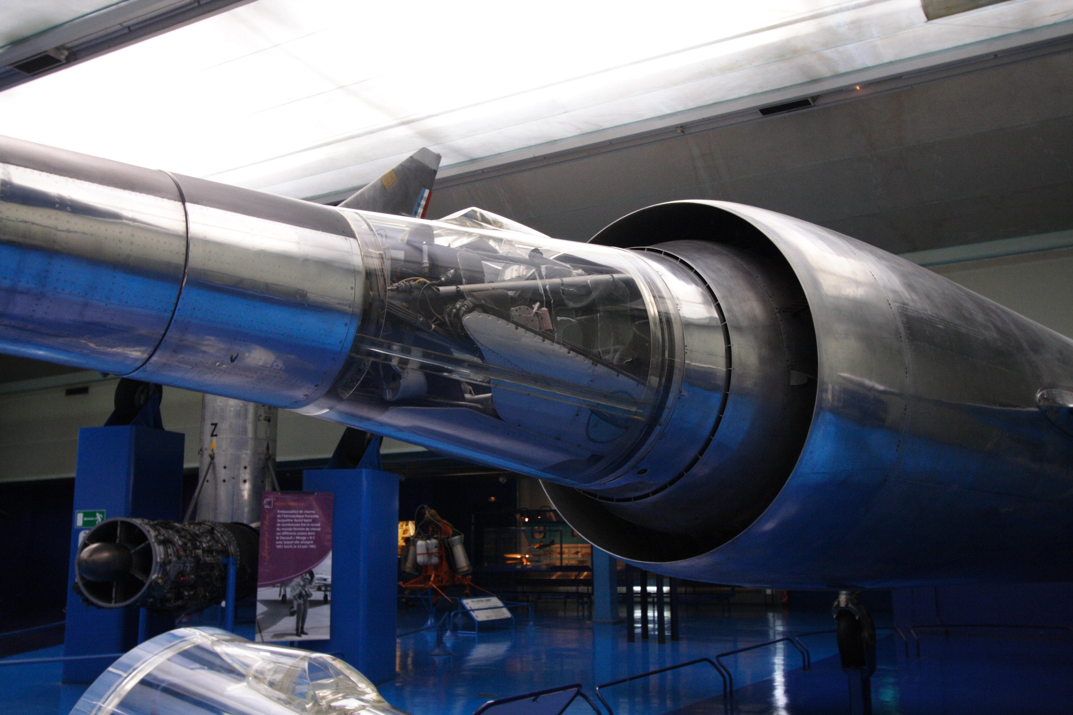 French experimental aircraft Leduc 022 (Musée de l'air et de l'espace, Le Bourget, France)